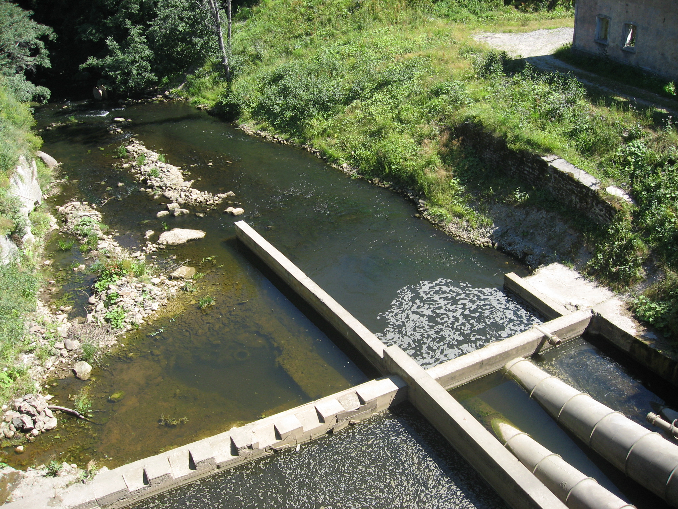 Řeka Kunda ve městě Kunda